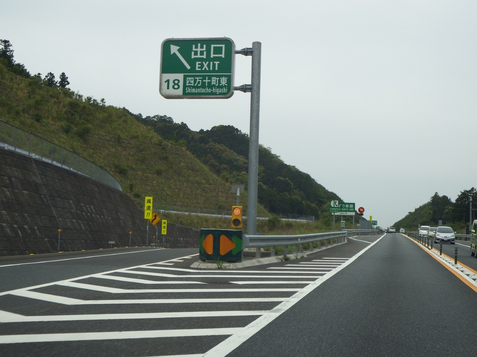 四万十町東インターチェンジ